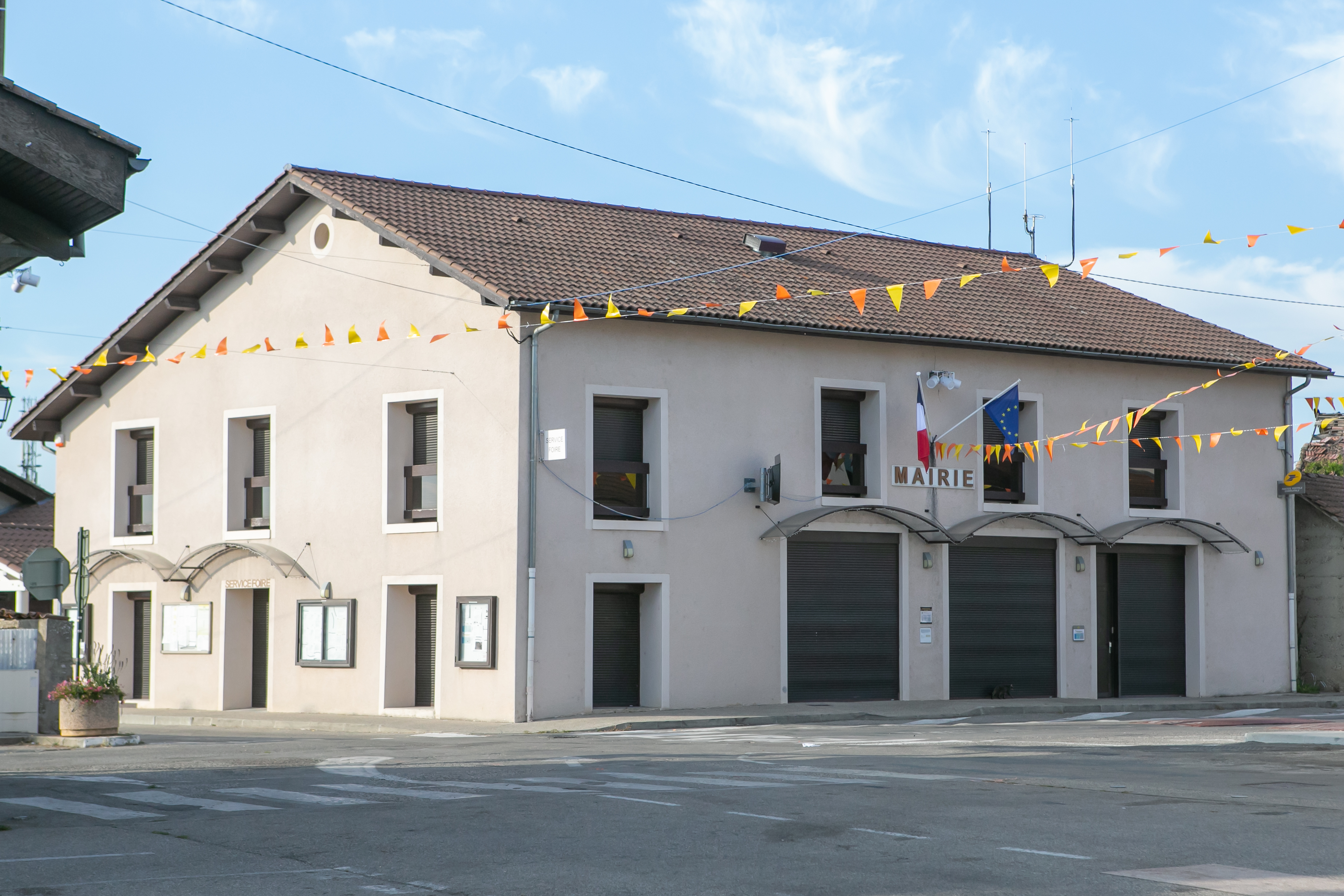 Vue générale de l'hôtel de ville de Beaucroissant (et de l'agence postale au rez-de-chaussée, sur le côté droit du bâtiment) / Isère / France